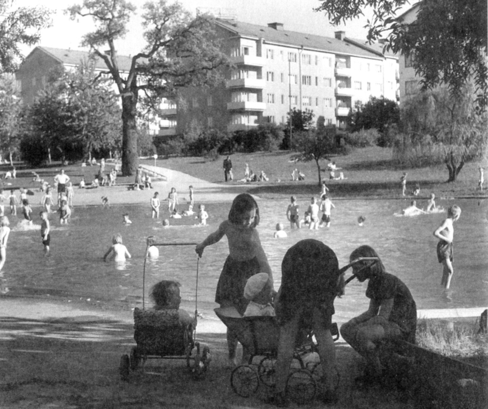 Plaskdammen i Fredhällsparken, Stockholm